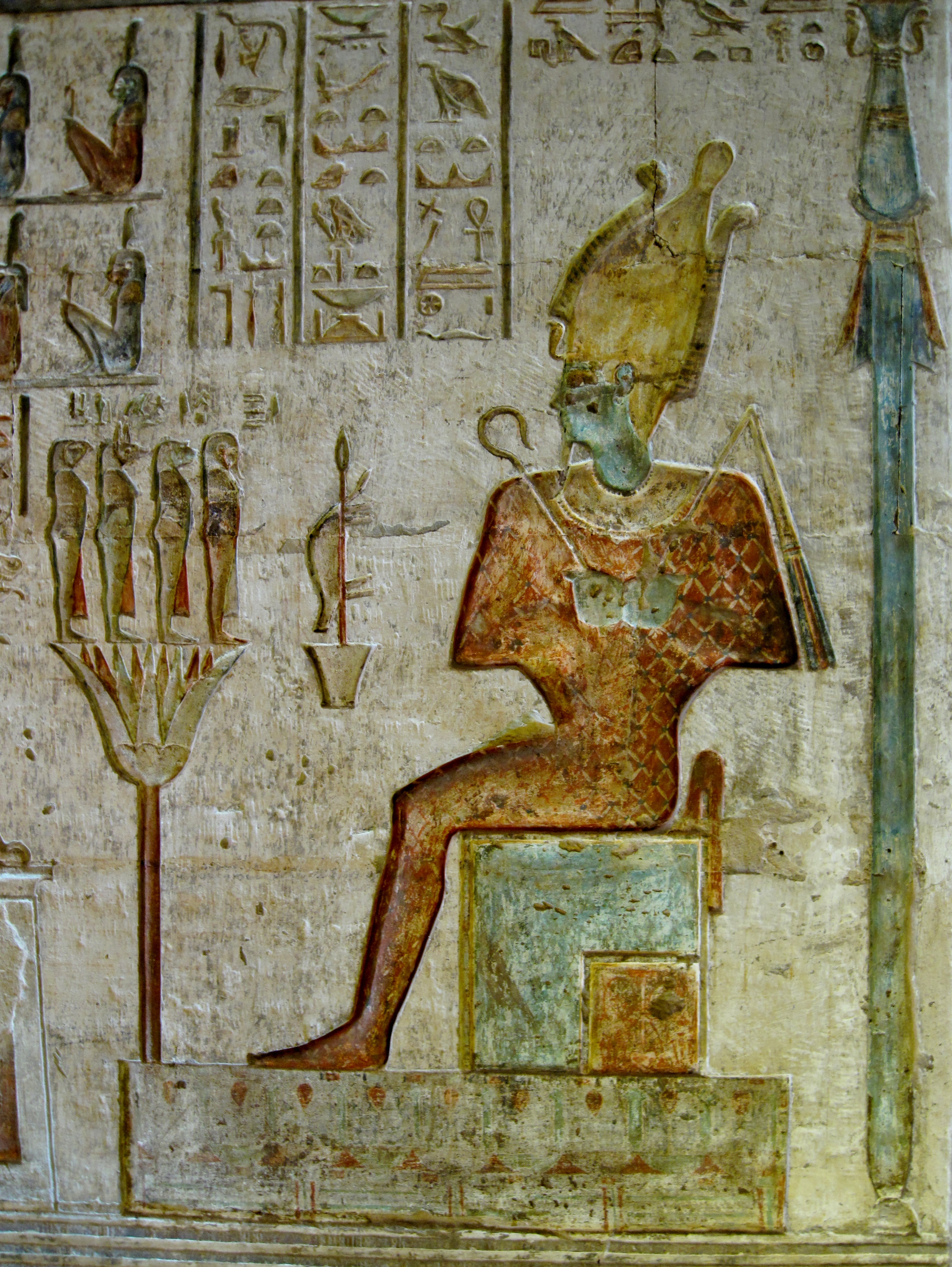 Relief im Innenraum des Hathor-Tempels von Deir el-Medina („Kloster der Stadt“), altägyptisch Set Maat („Platz der Wahrheit“), in Theben-West bei Luxor, Ägypten